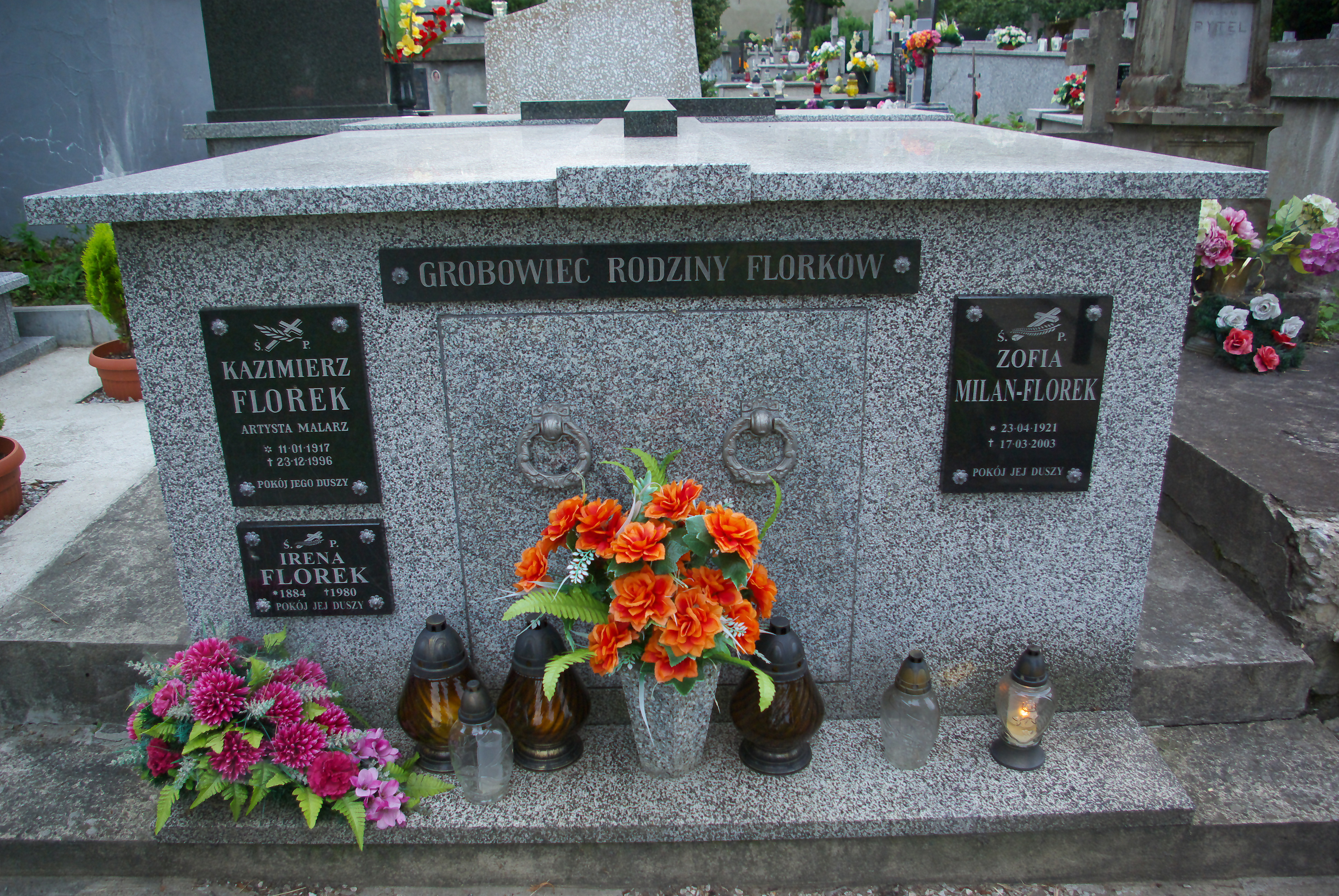 Grobowiec rodziny Florek na Cmentarzu Centralnym w Sanoku